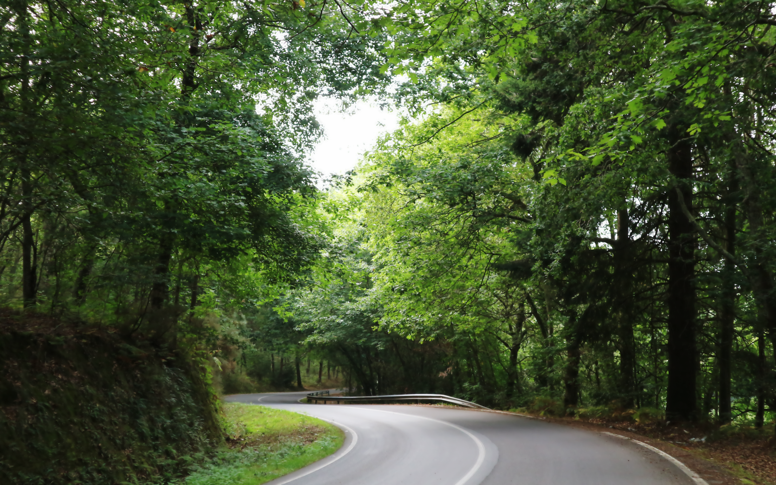 Estrada ao paso pola "carballeira da Chousa", entre a Praza e Figueiroa Pequeno. Figueiroa, Abegondo.